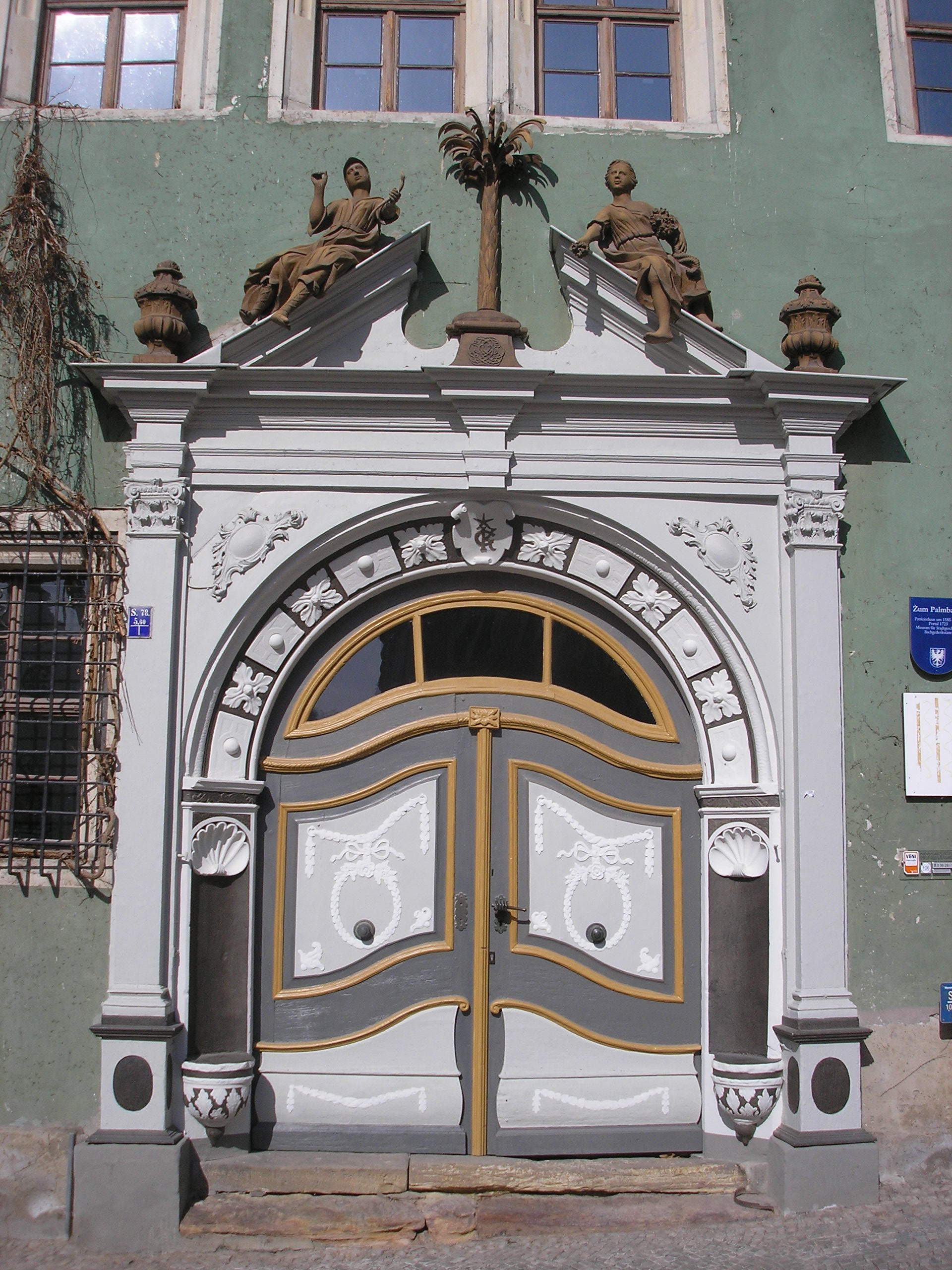 Das Portal des Hauses zum Palmbaum am Markt in Arnstadt (Thüringen).